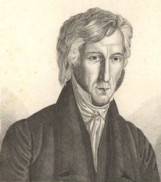 Иоганн Фридрих Людвиг Гёшен - ректор Берлинского Университета в 1819-20х годах. Гравюра на меди братьев Рокко из Гёттингена.